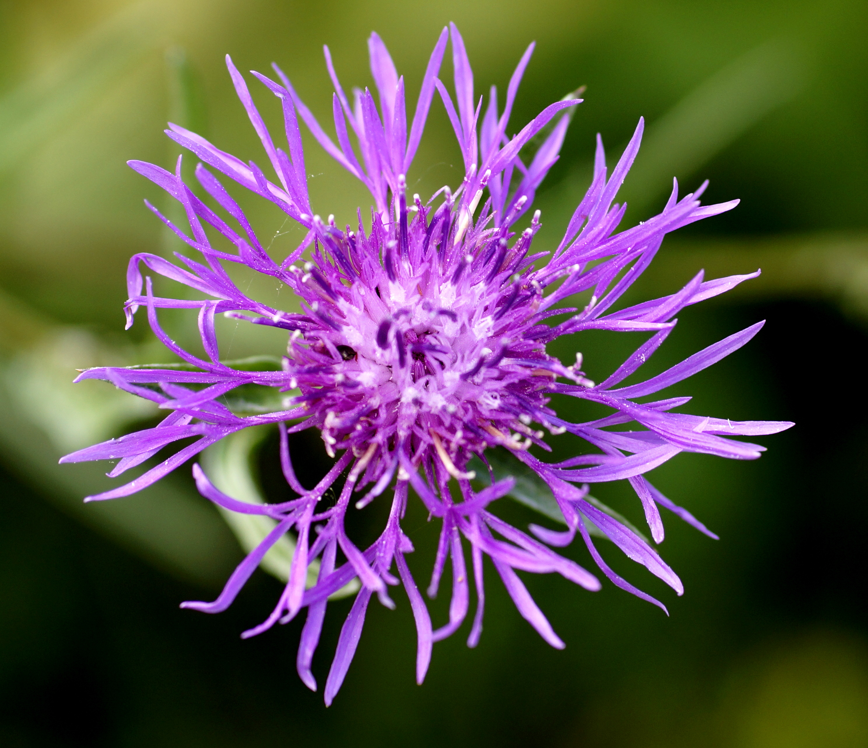 Gemeine Flockenblume, Asteraceae, Deutschland, Bayern, Oberfranken, Selbitz Foto: U.Schmidt, 11.VIII.2012